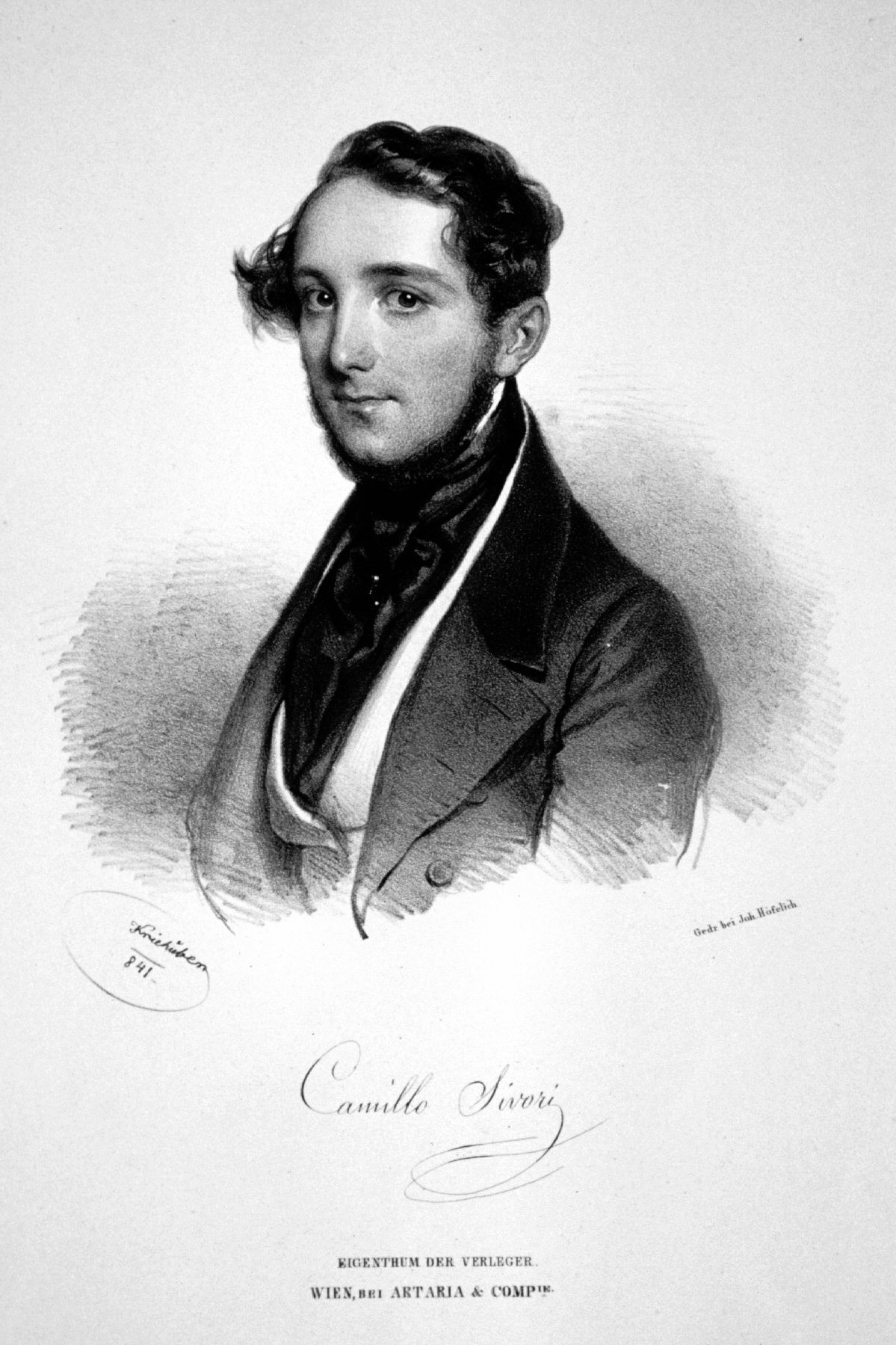 Camillo Sivori (1815-1894), italienischer Geigenvirtuose und Komponist.